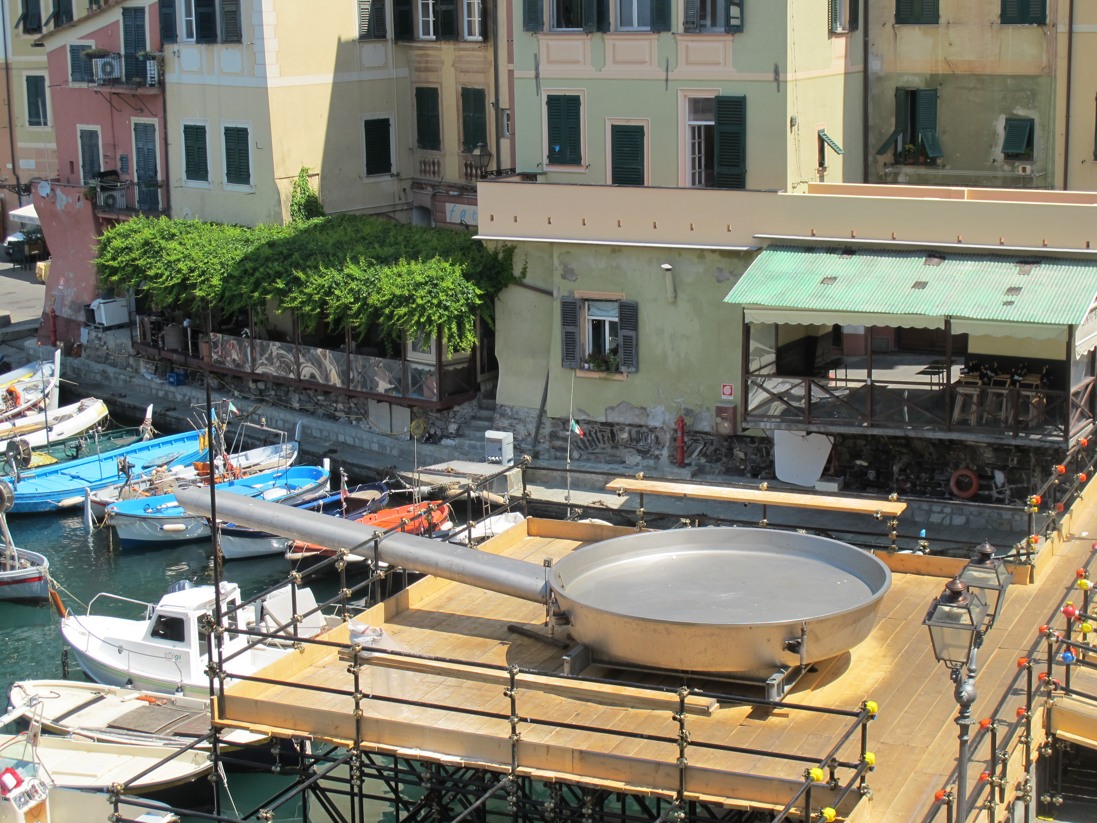 Il padellone che ogni anno si usa a Camogli, Italia, per la Sagra del Pesce.